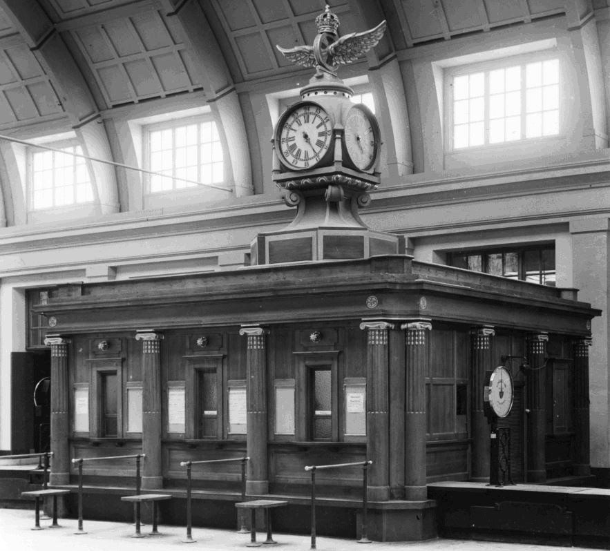 Resgodskiosken i centralhallen, sent 1920-tal